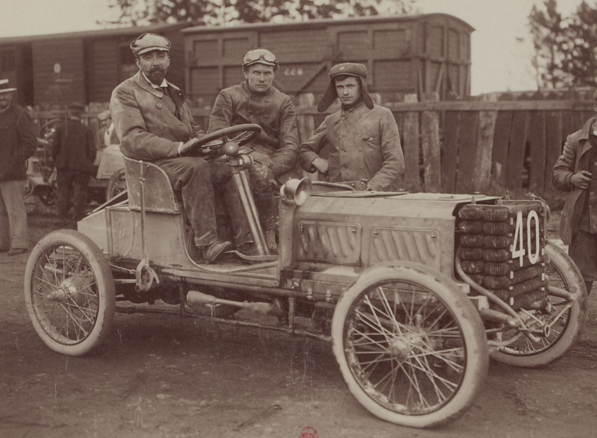 [Collection Jules Beau. Photographie sportive] : T. 18. Année 1902 / Jules Beau : F. 41v. [Circuit des Ardennes, Bastogne, 30 juillet 1902]